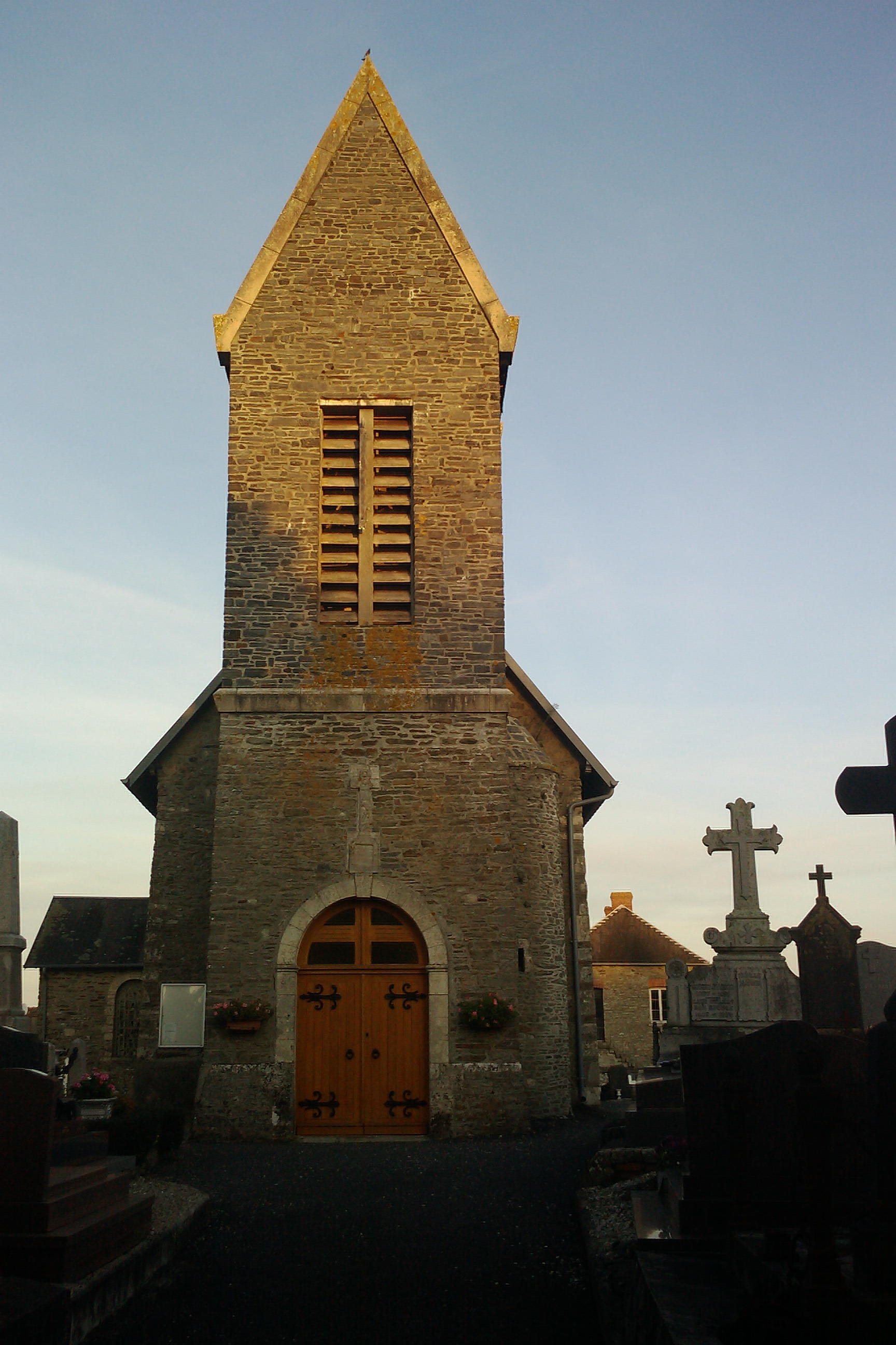 Saint-Georges-d'Elle